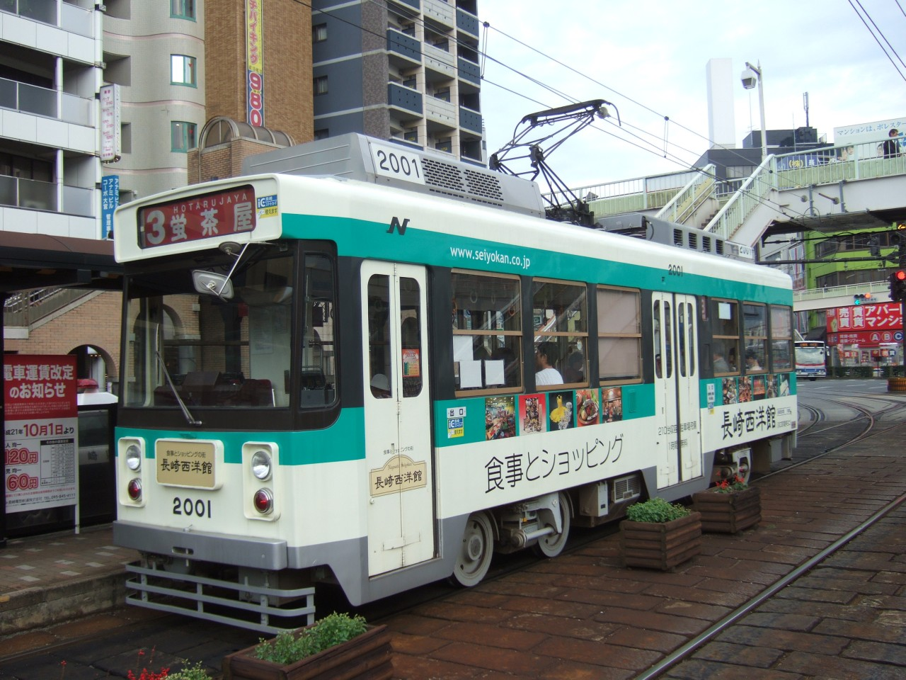 長崎電気軌道2000形電車2001号（長崎駅前電停にて）